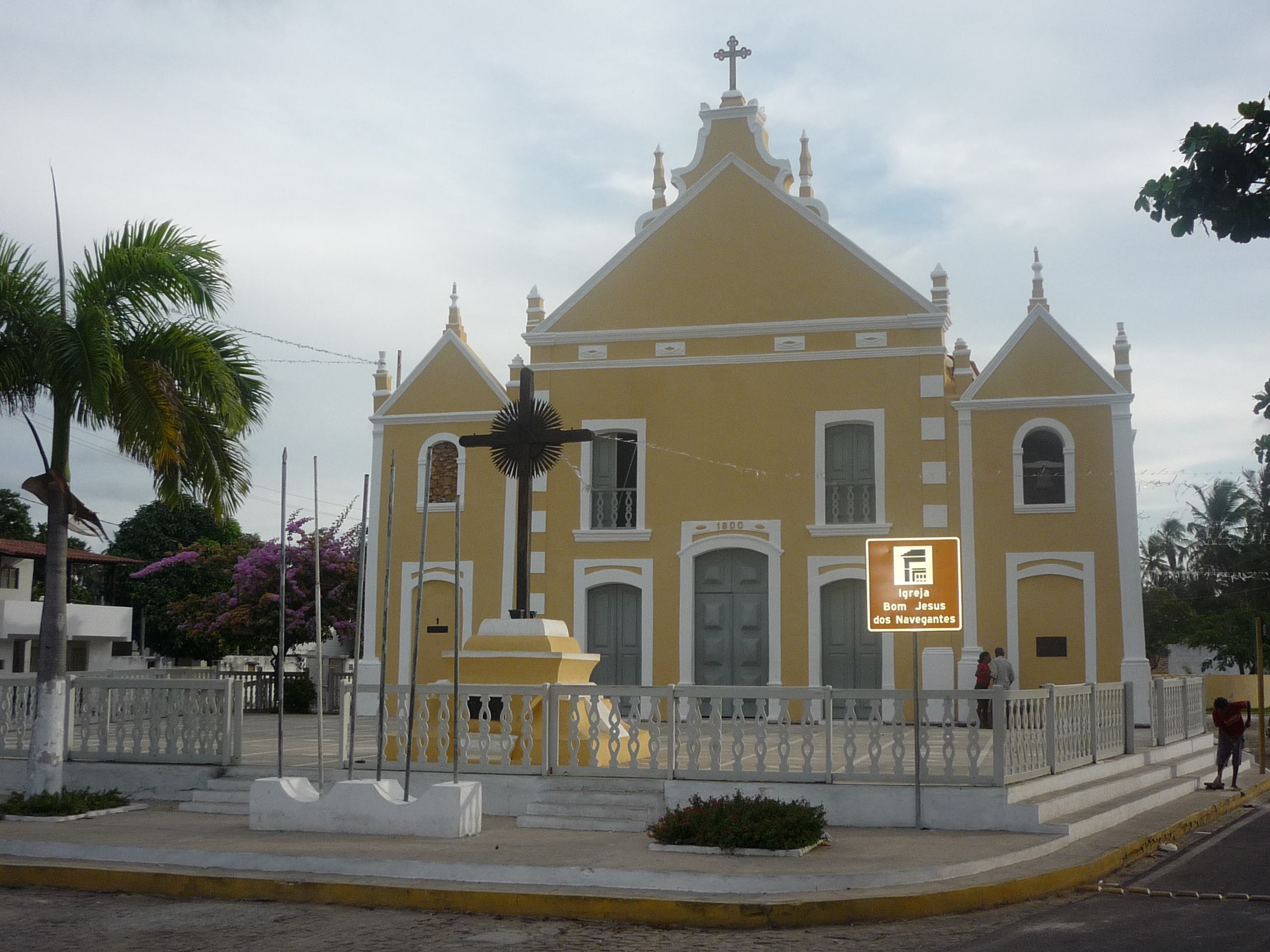 Igreja matriz da paróquia de Bom Jesus dos Navegantes, em Touros, Rio Grande do Norte (Brasil).